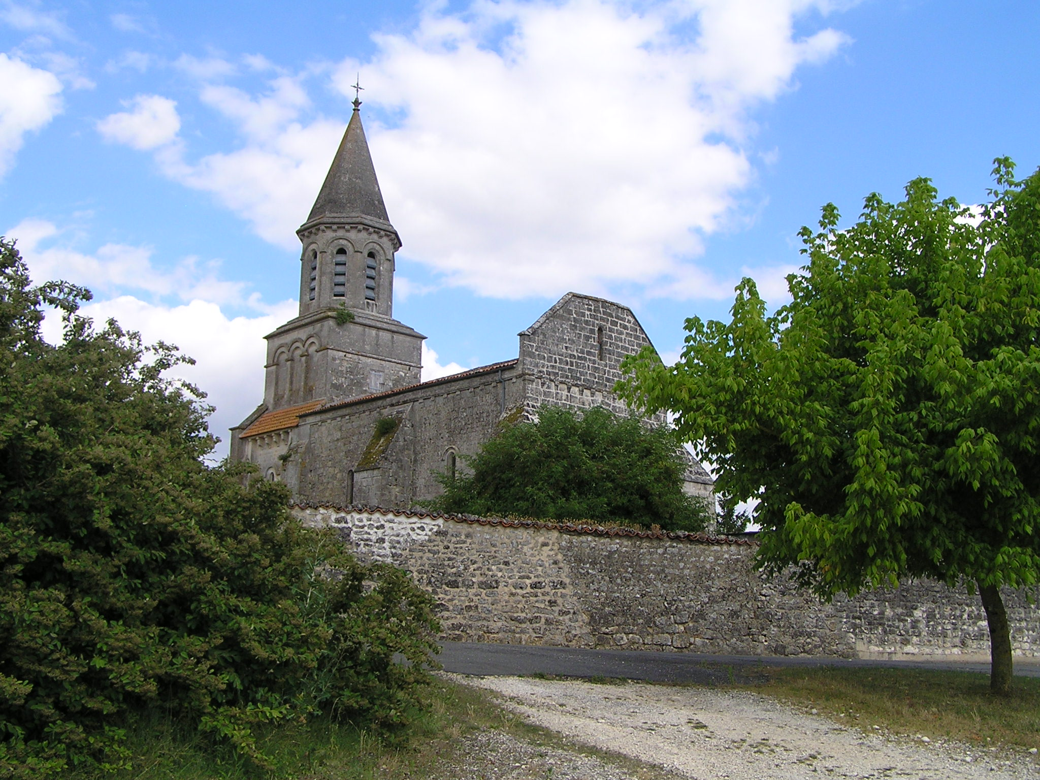 église de Saint-Simeux, Charente, France